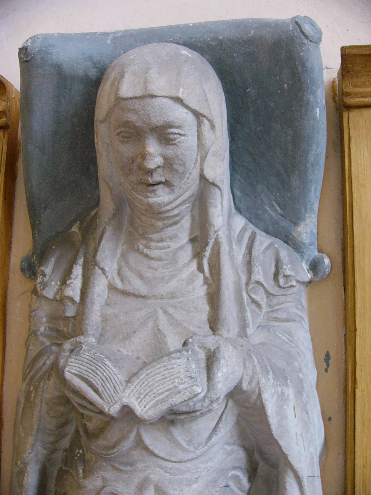 Epitaph der Anna von Henneberg, Äbtissin von Kloster Sonnefeld